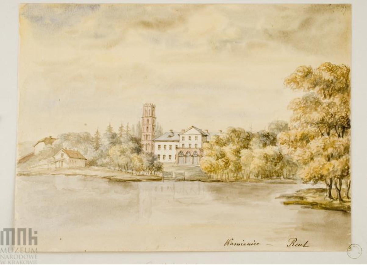 Nielitografowany rysunek Napoleona Ordy, prawdopodobnie z lat 1875–1876. Obecnie Kamieniec Inflancki nazywa się Jaunaglona